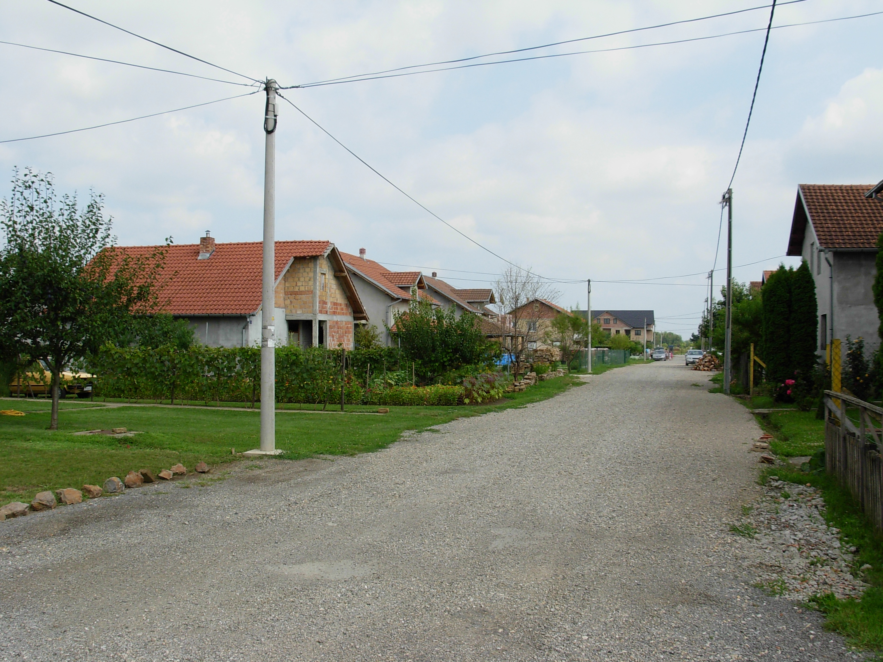 Ulica na Sajlovu, Novi Sad.